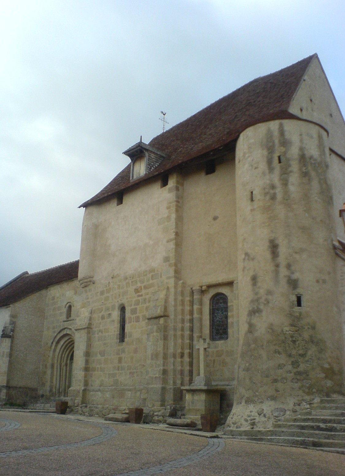 église